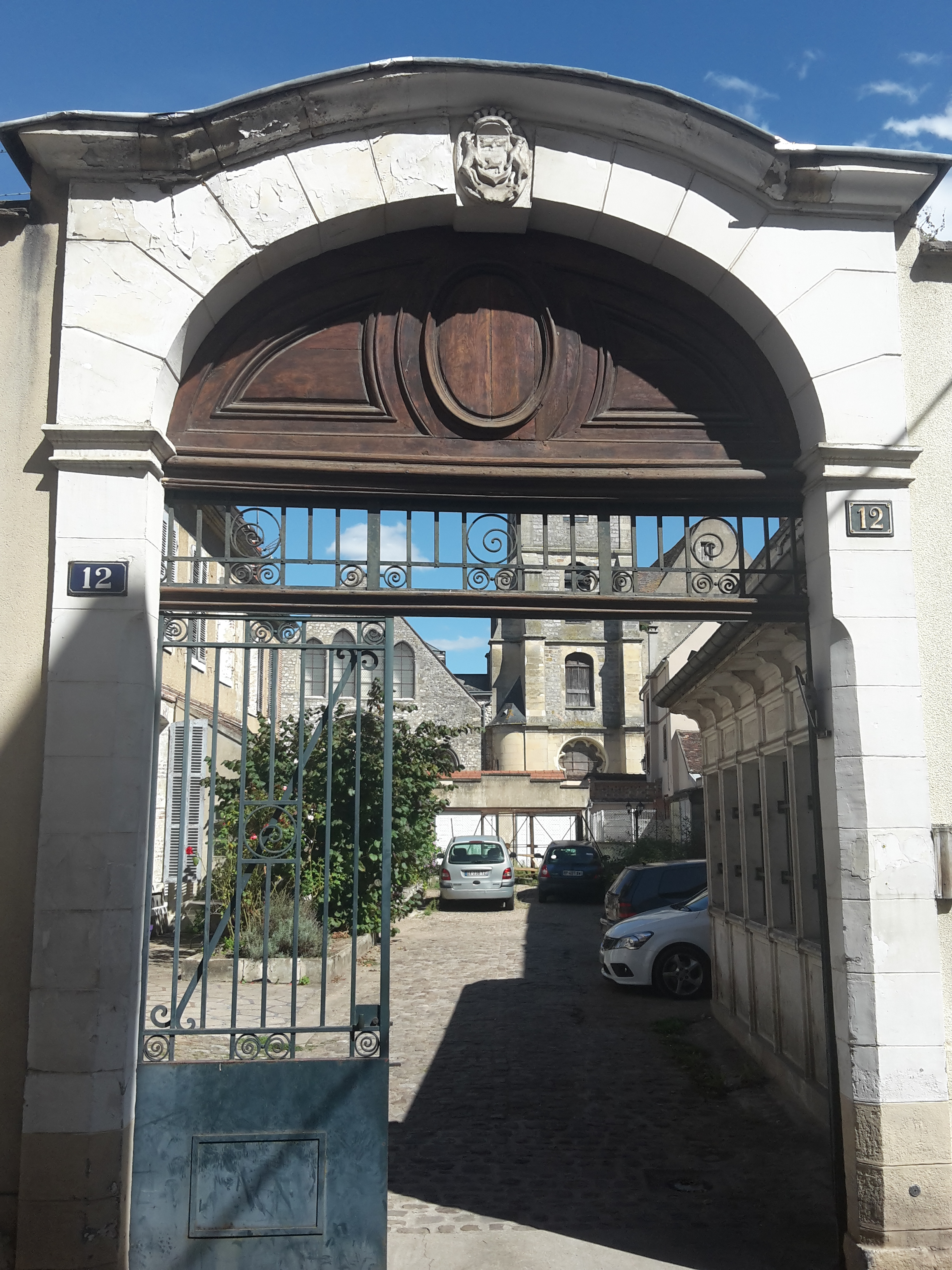 Portail de l'Hôtel de Bourienne, maison natale de la famille de Fauvelet de Bourienne, comtes de Charbonnières. Marivaux, David d'Angers et l'Empereur Napoléon Ier y ont séjourné.